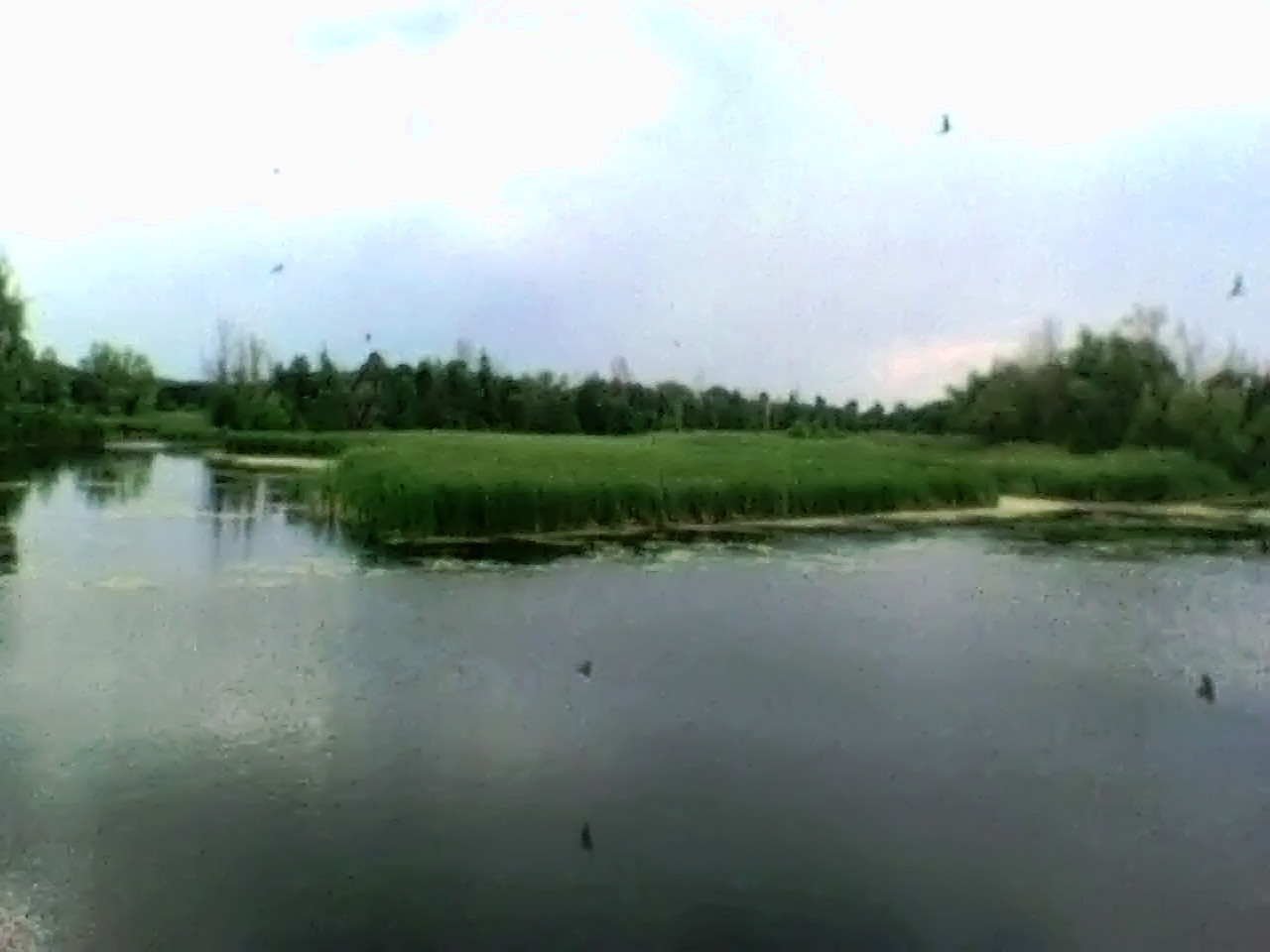 р. Ворскла у селі Міські Млини